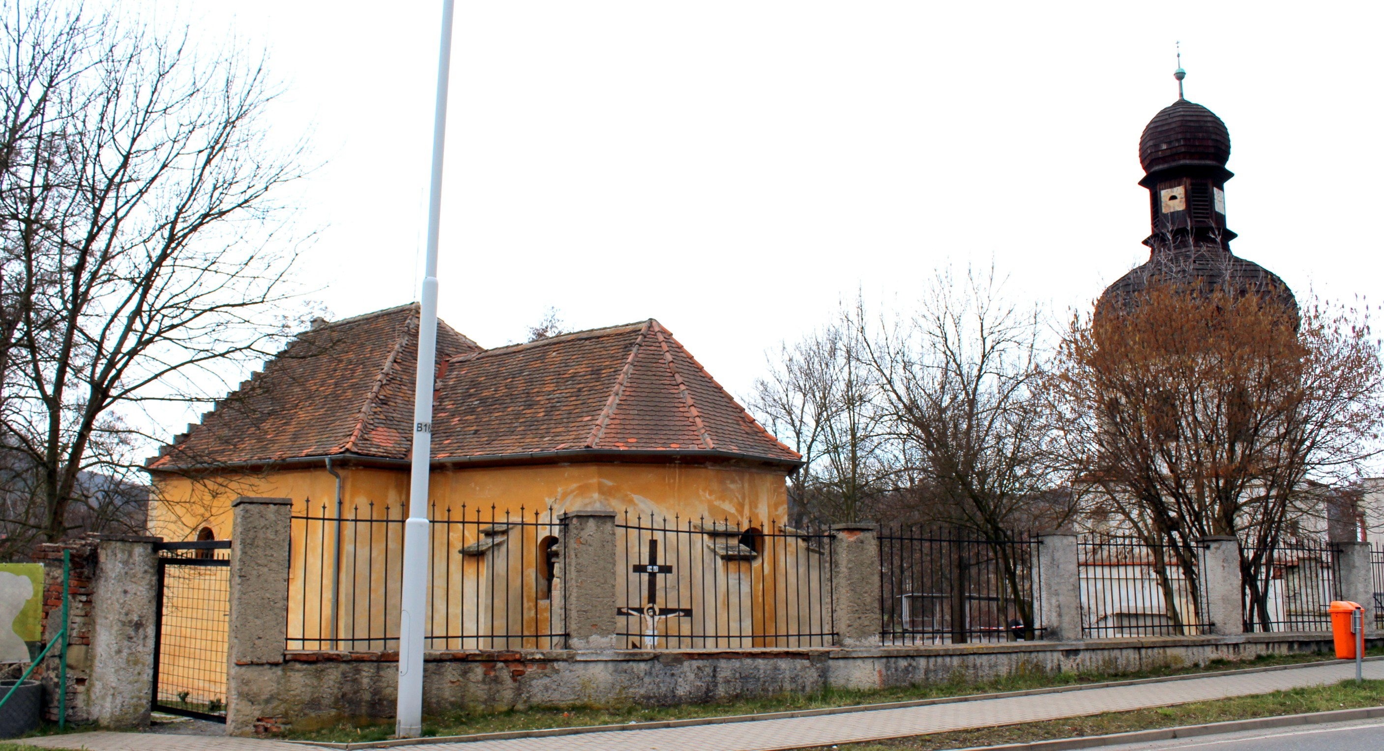 Debř, pravoslavný kostel sv. Barbory